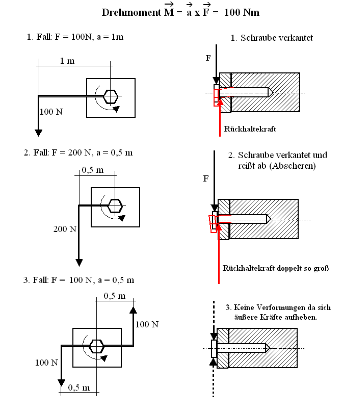 gez.